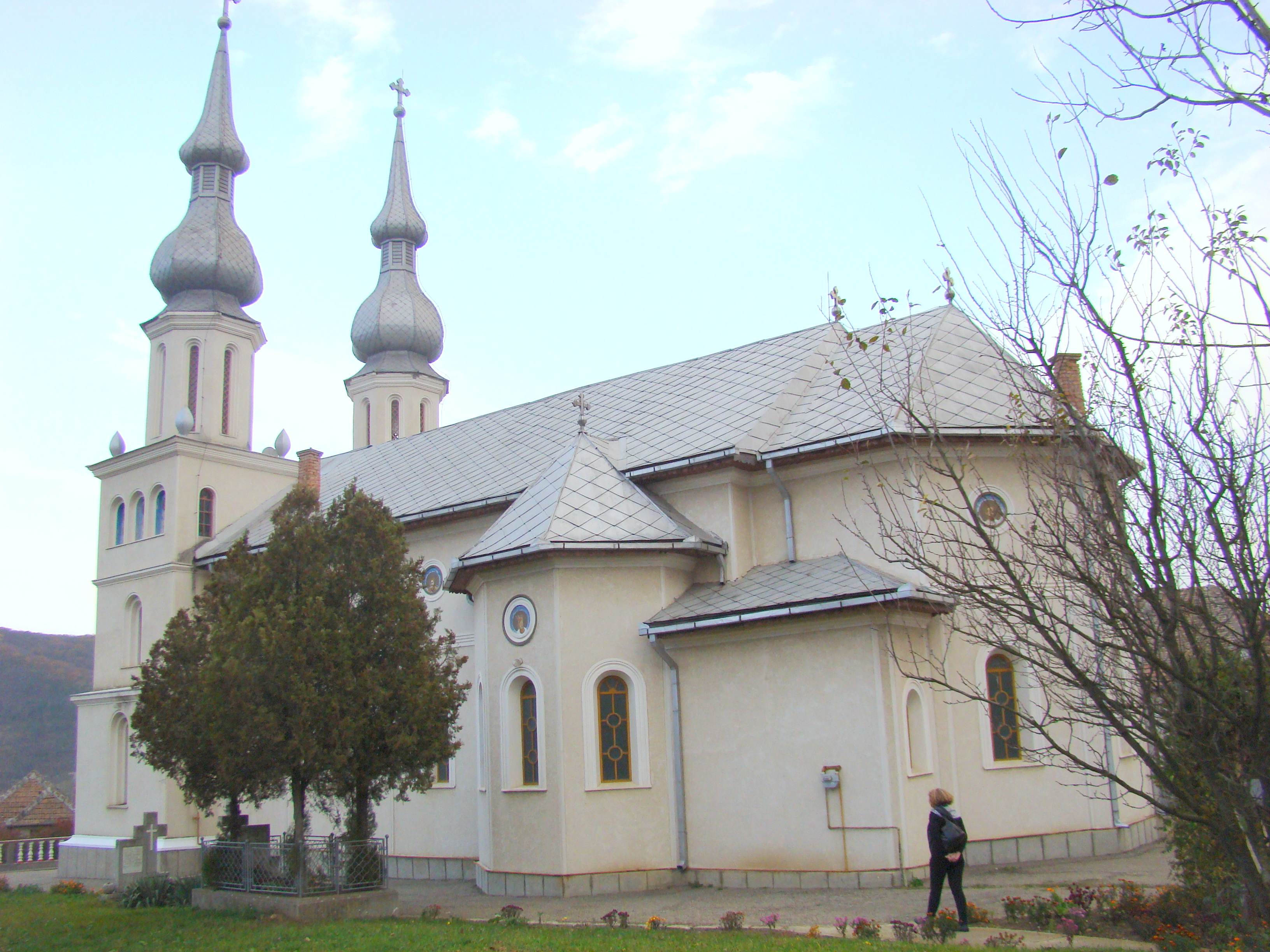 Biserica ortodoxă,Cetatea de Baltă, Alba